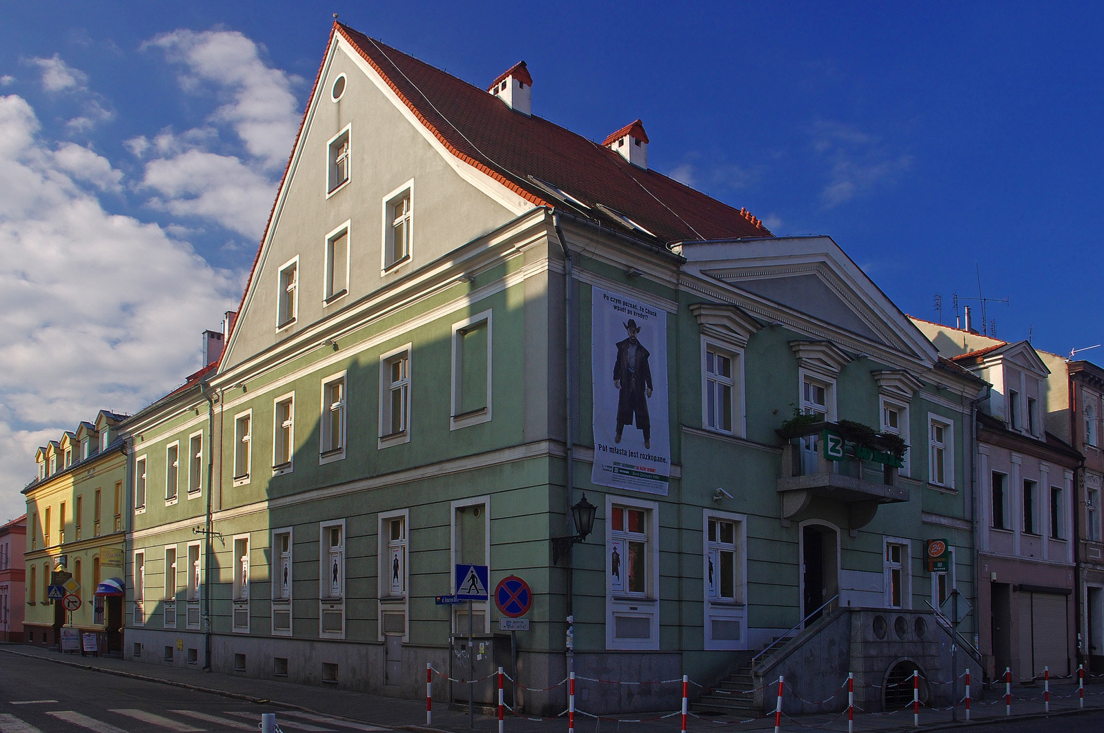 dom z 1. połowy XIX w. Rawicz, Rynek 18, Rawicz